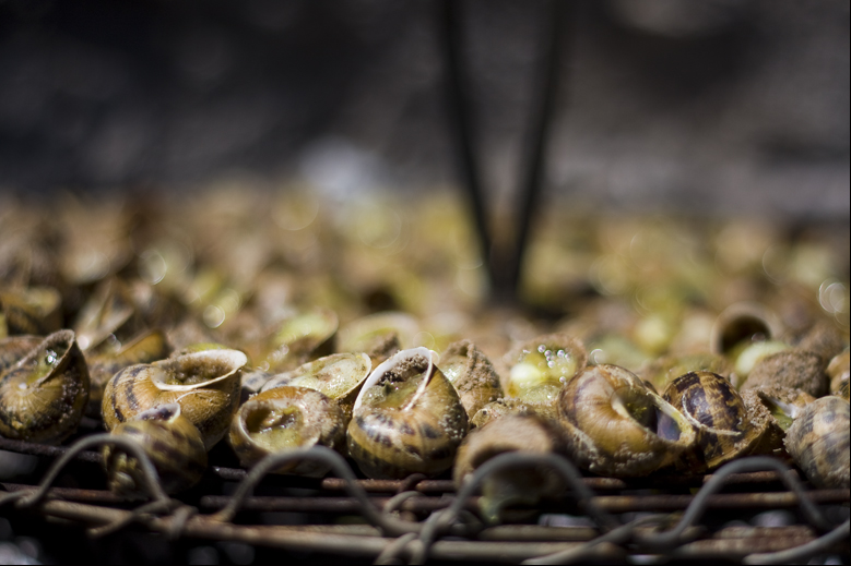 Cargolade : cargols (escargots) en situation, en pays Catalan